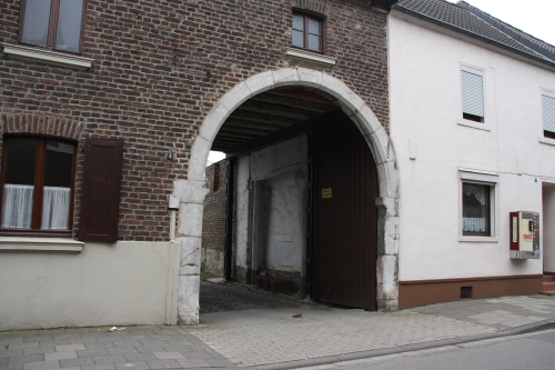 Peterstr. 4 in Düren-Merken